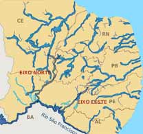 Mapa da transposicao do Rio Sao Francisco